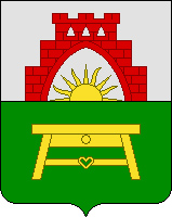 Wappen der russischen Stadt Nesterow (dt. Stallupönen od. Ebenrode)